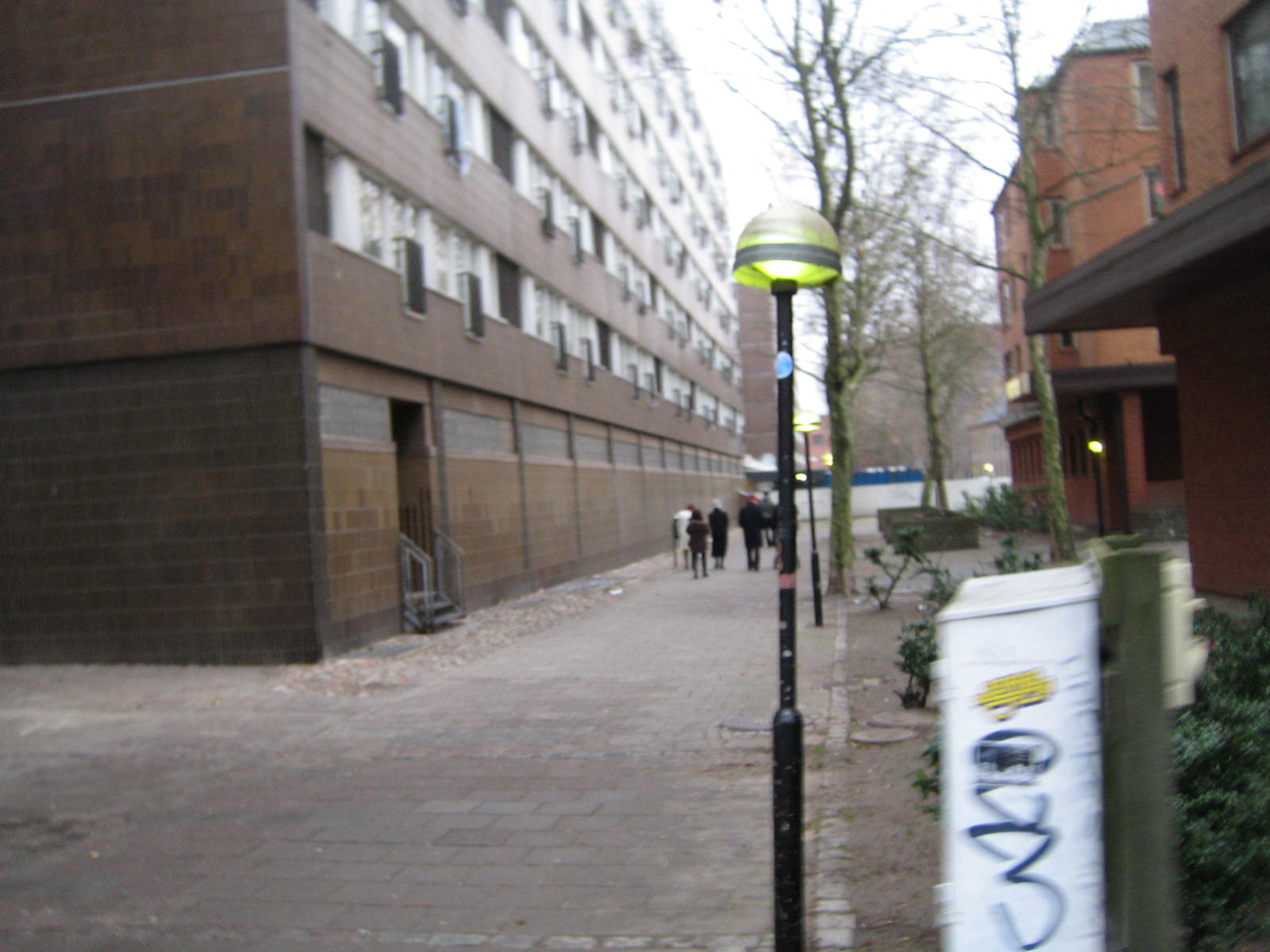 Nya Humlegatan, Malmö, 2007